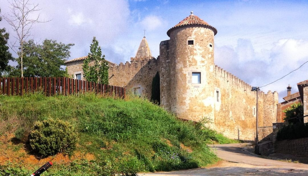 Església de Sant Cugat, a la part posterior